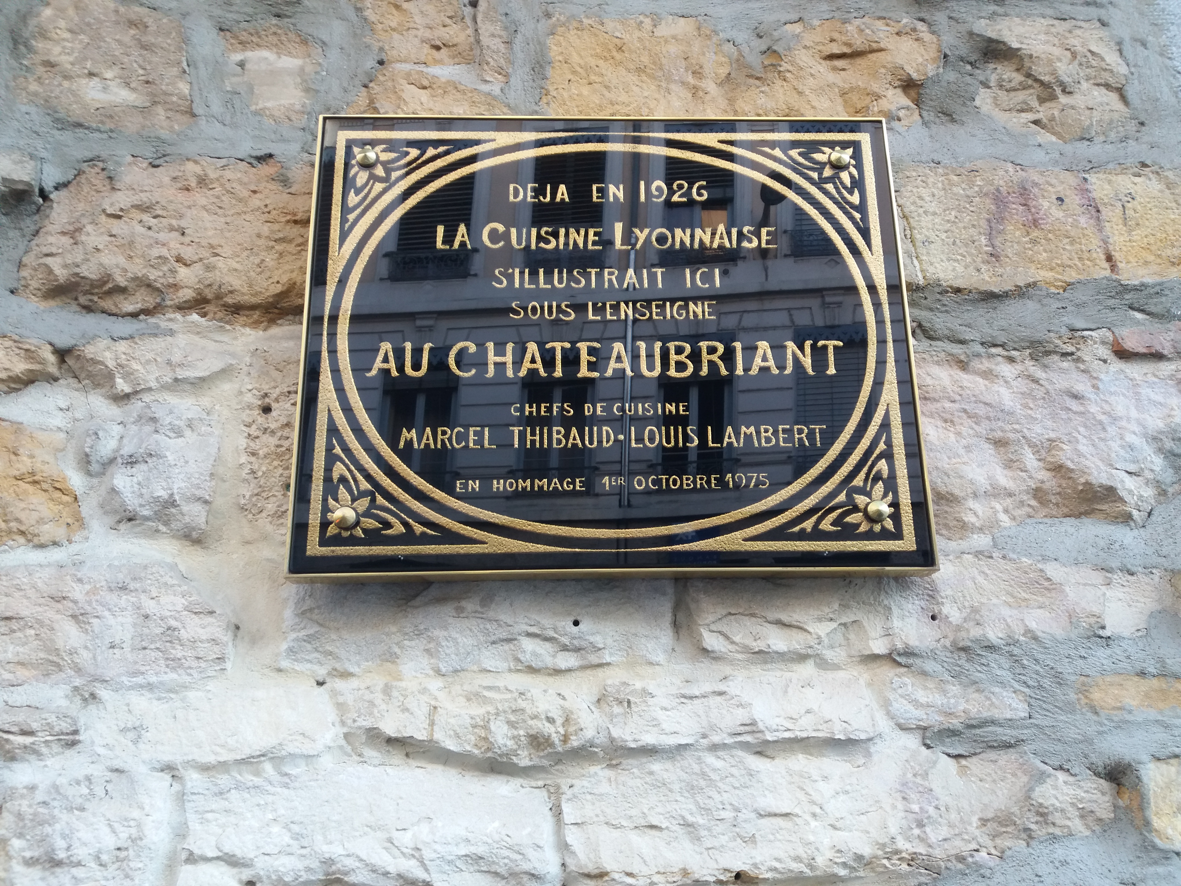 Rue Boileau : plaque restaurant Au Chateaubriant.